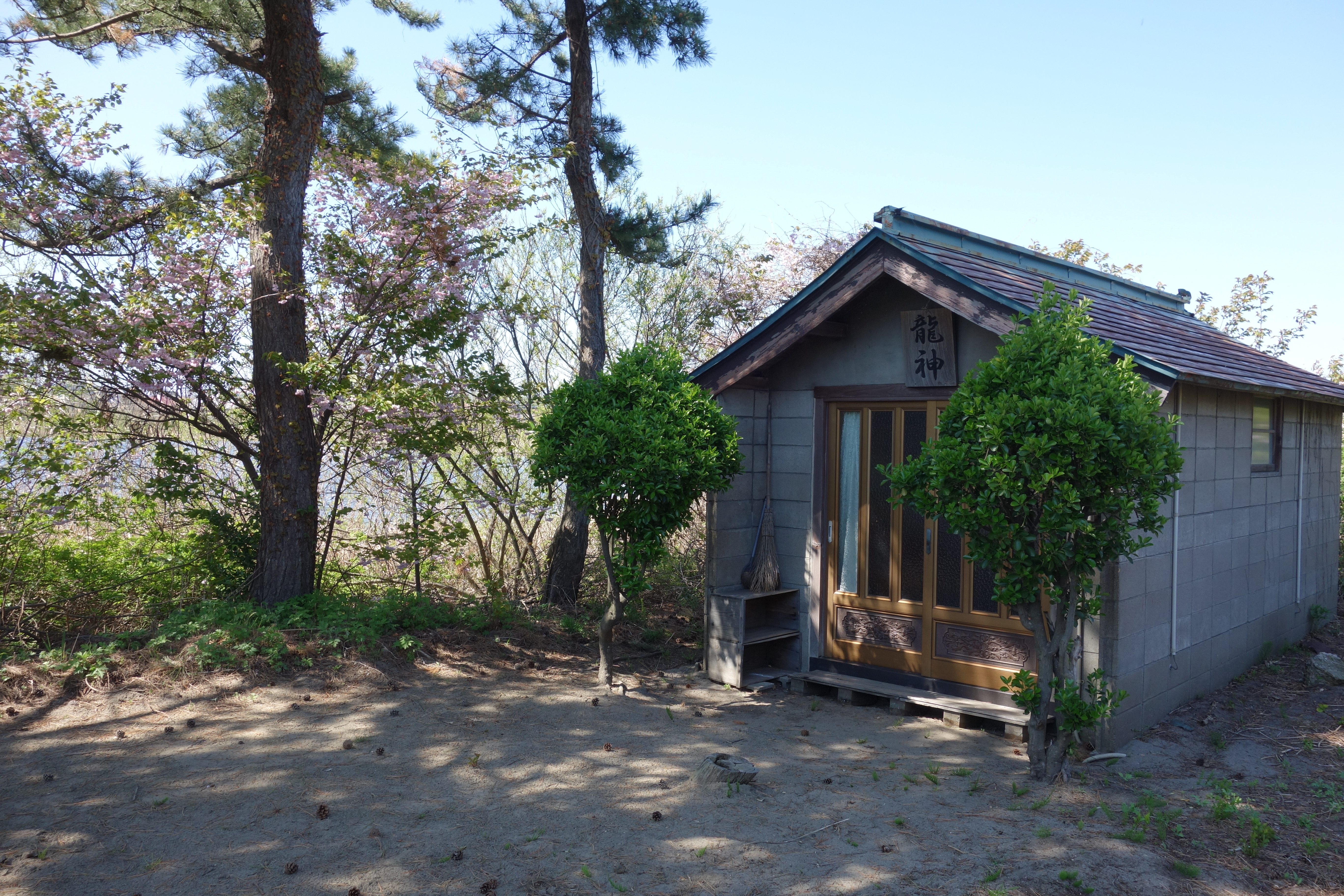 三頭沼のほとりにある五月雨大明神